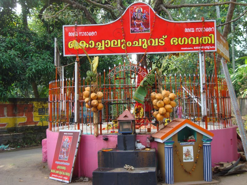 വൈക്കം വടക്കേ ഗോപുരനടയിലുള്ള കൊച്ചാലുംചുവട് ഭഗവതി